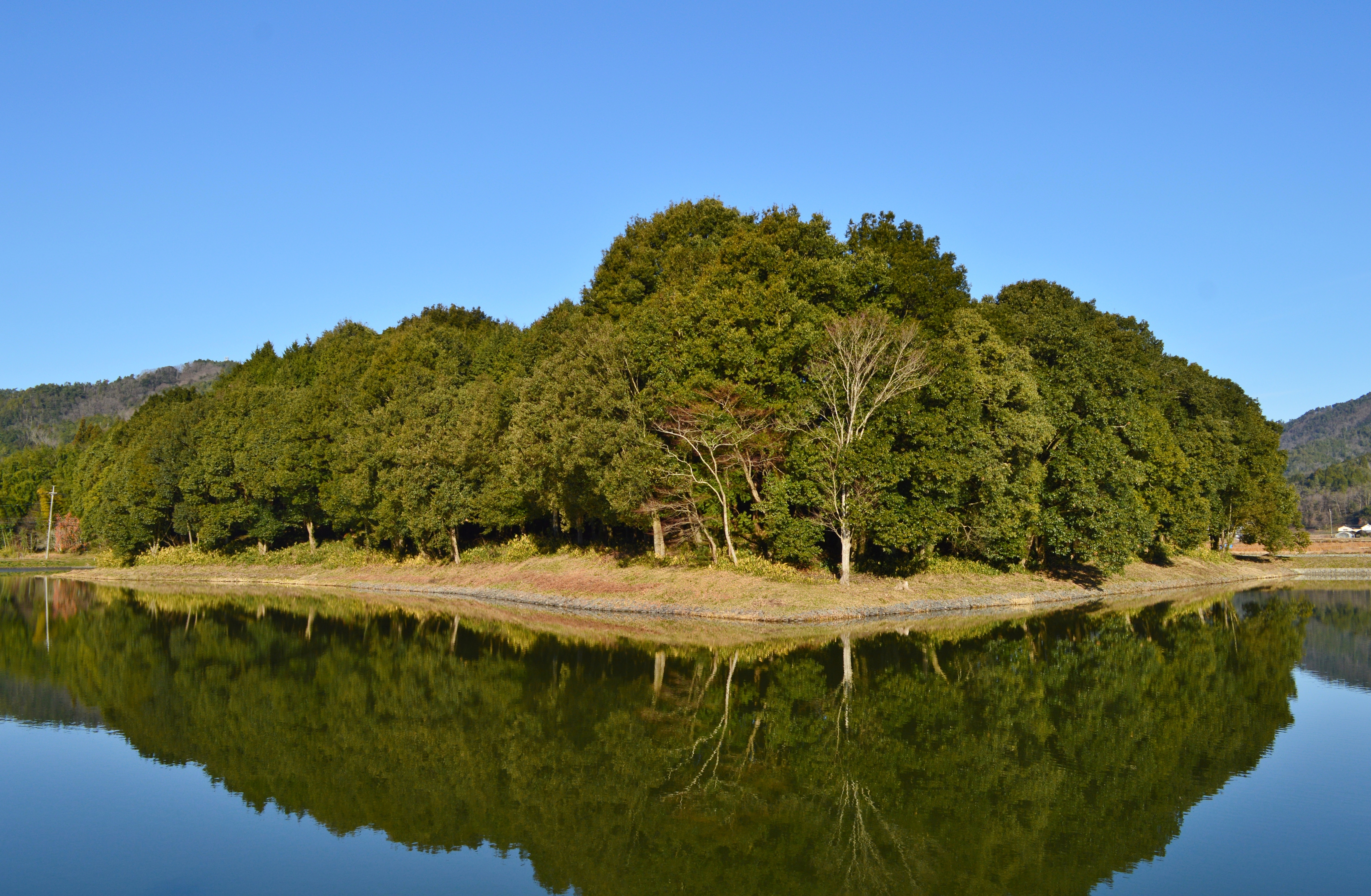 雲部車塚古墳 墳丘全景